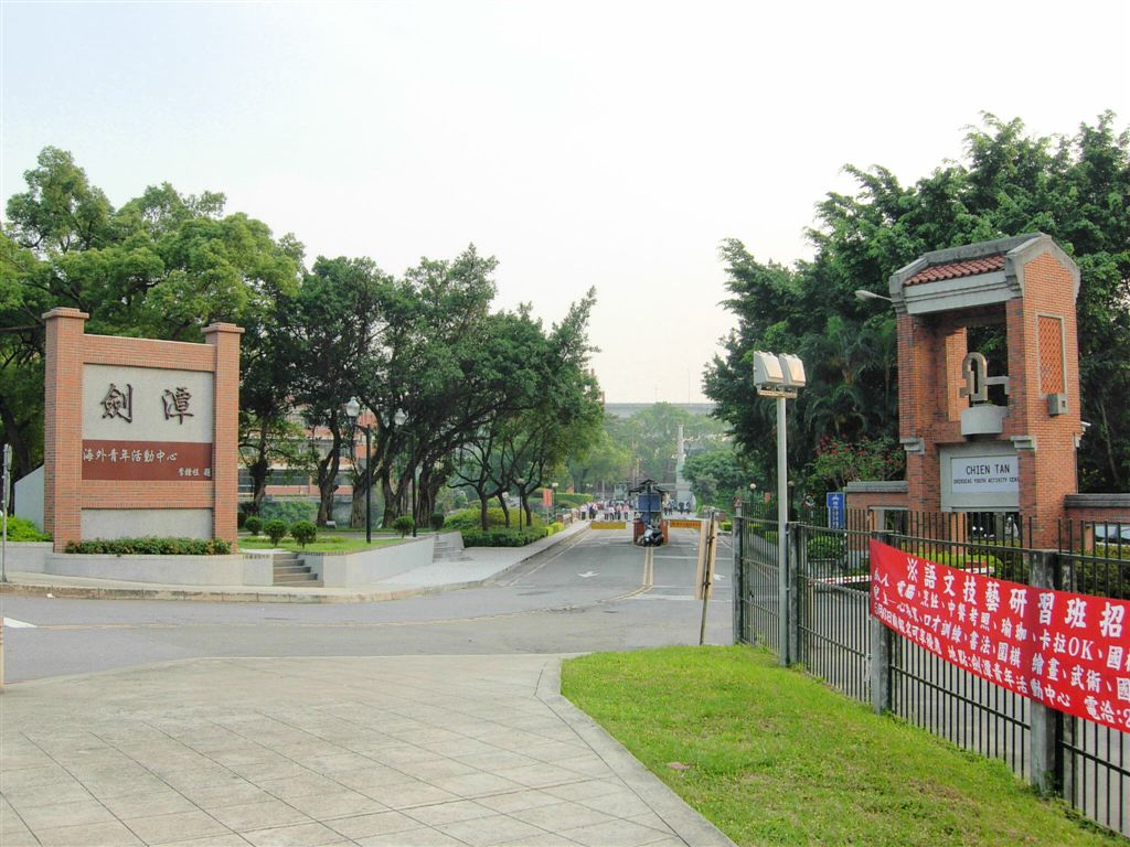 臺北市劍潭青年活動中心入口。